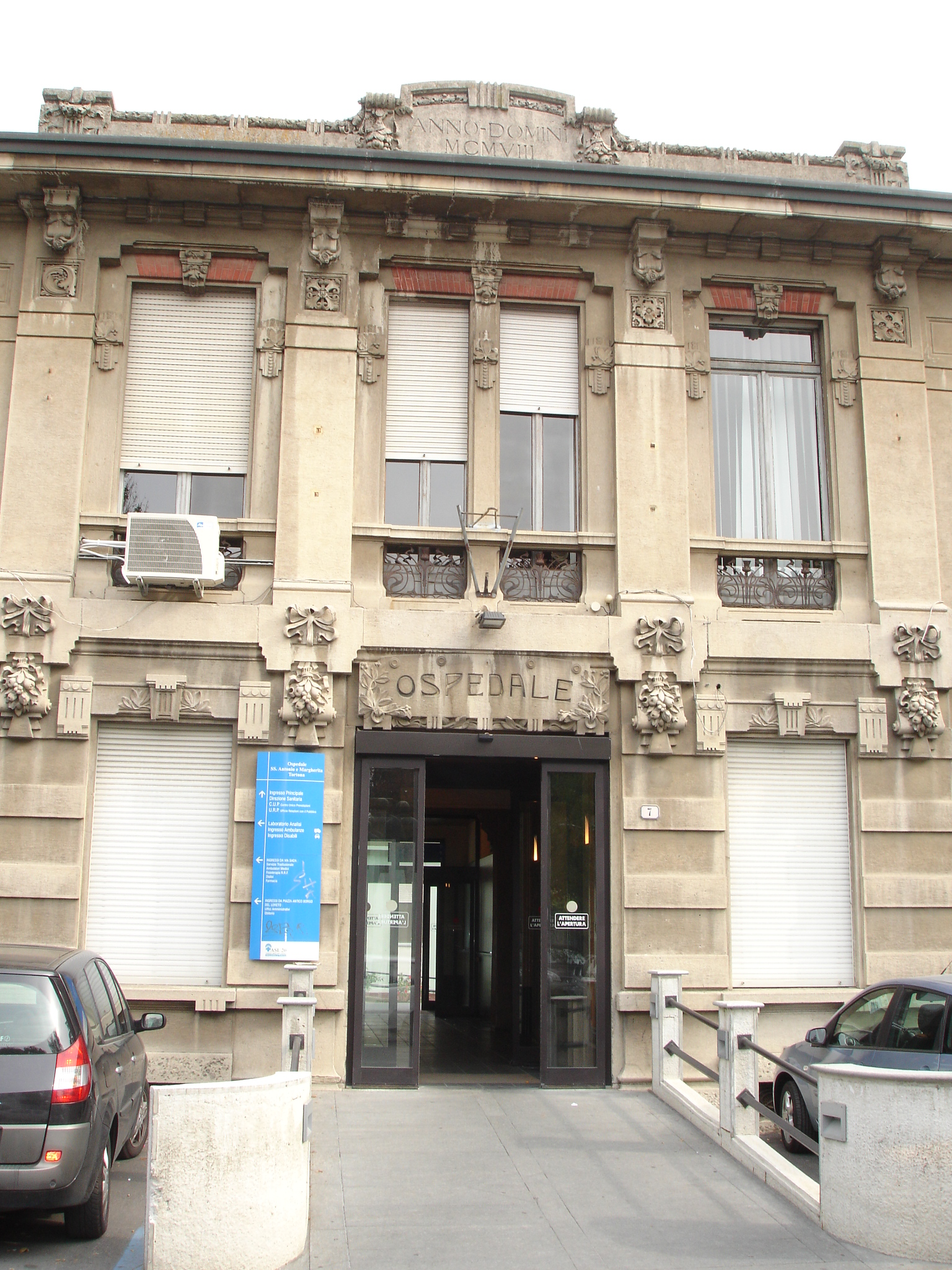 Tortona - Facciata dell'Ospedale - 1908. Autore: Tony Frisina - Alessandria